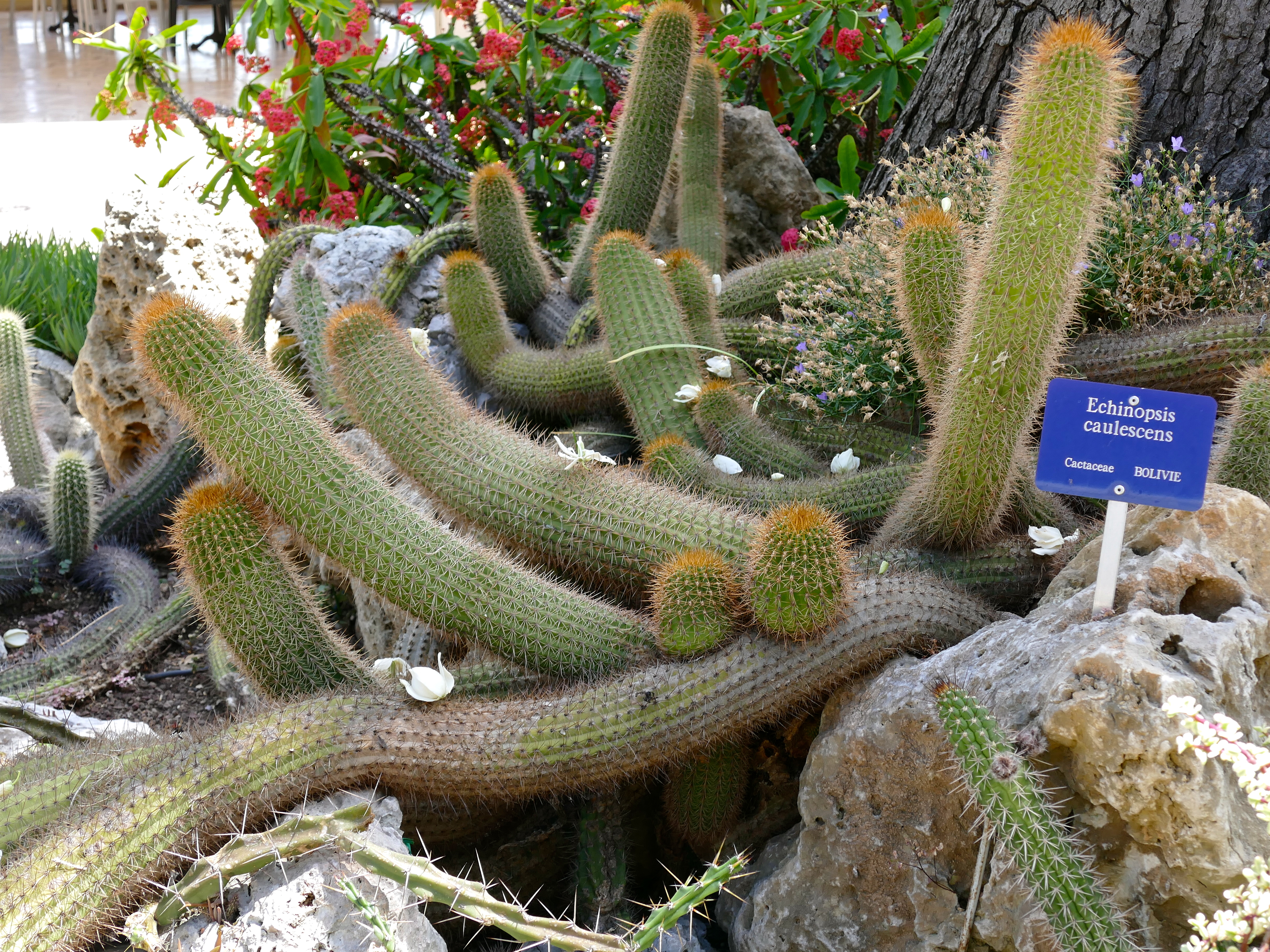 Jardin Exotique, MONACO